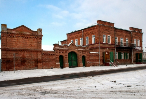 Усадьба Ченцовых находится по ул. Ленина, 56 в селе Новая Заимка Заводоуковского района Тюменской области. Является редким в сельской местности образцом сохранившегося каменного усадебного комплекса рубежа XIX – XX вв.